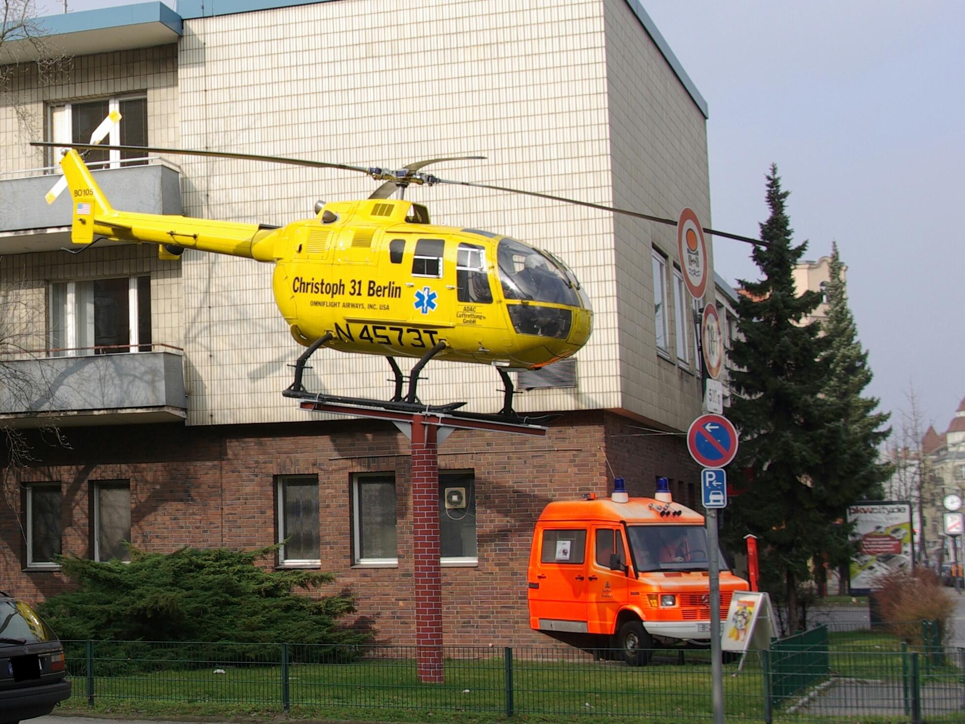 Berlin, Tegel, das Feuerwehrmuseum aussen mit Hubschrauber und Rettungswagen